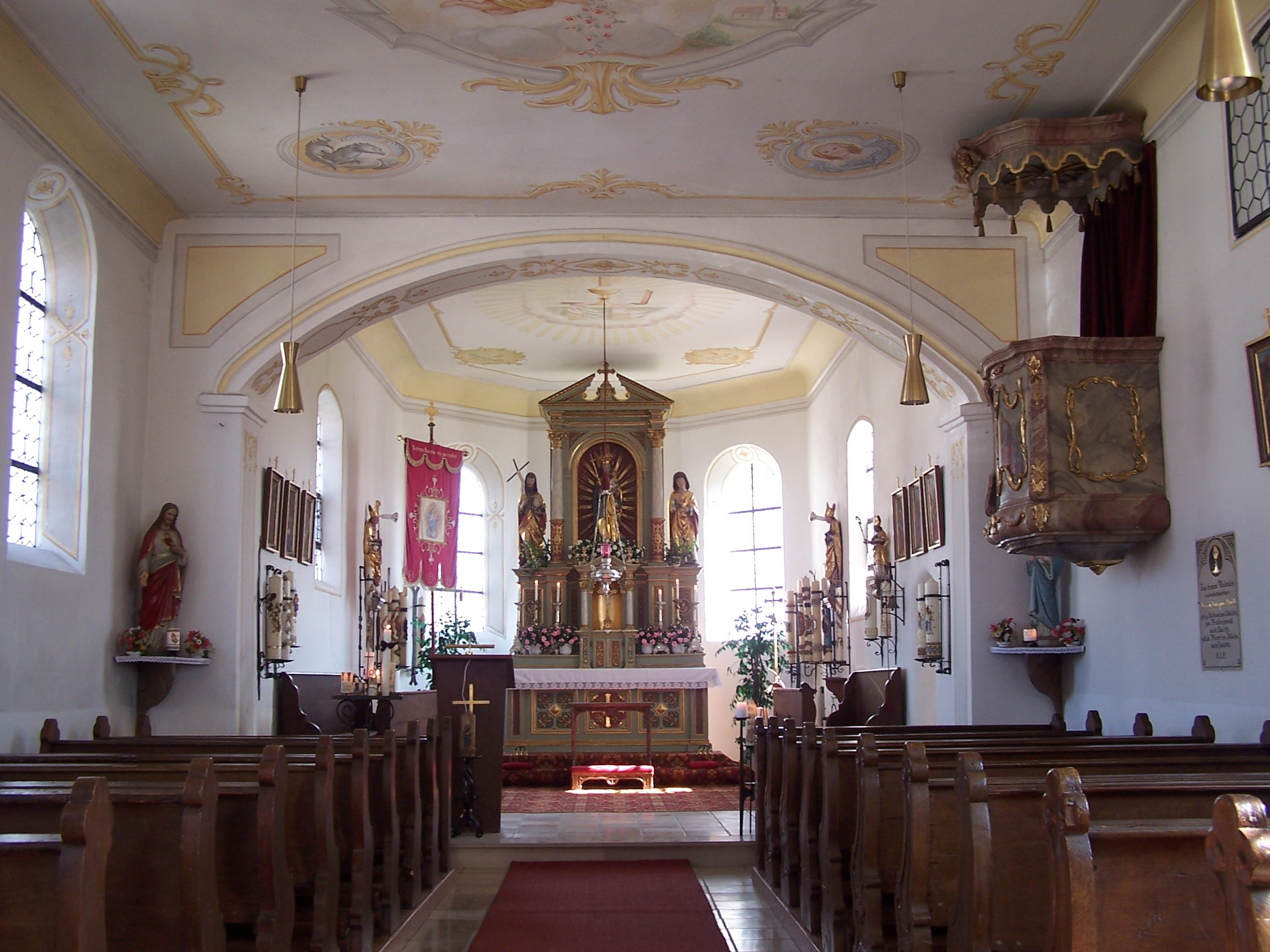 Weihmichl, Stollnried, Kirchstraße 5. Wallfahrtskirche Mariä Himmelfahrt. Saalkirche mit eingezogenem Chor, Anlage des frühen 14. Jahrhunderts, Verlängerung des Schiffes nach Westen 1847, Chorerweiterung 1896. Der helle Innenraum mit Flachdecken in Chor und Langhaus und gedrücktem Chorbogen ist mit großen Deckengemälden in Pastelltönen ausgestattet. Kanzel Spätrokoko um 1780.